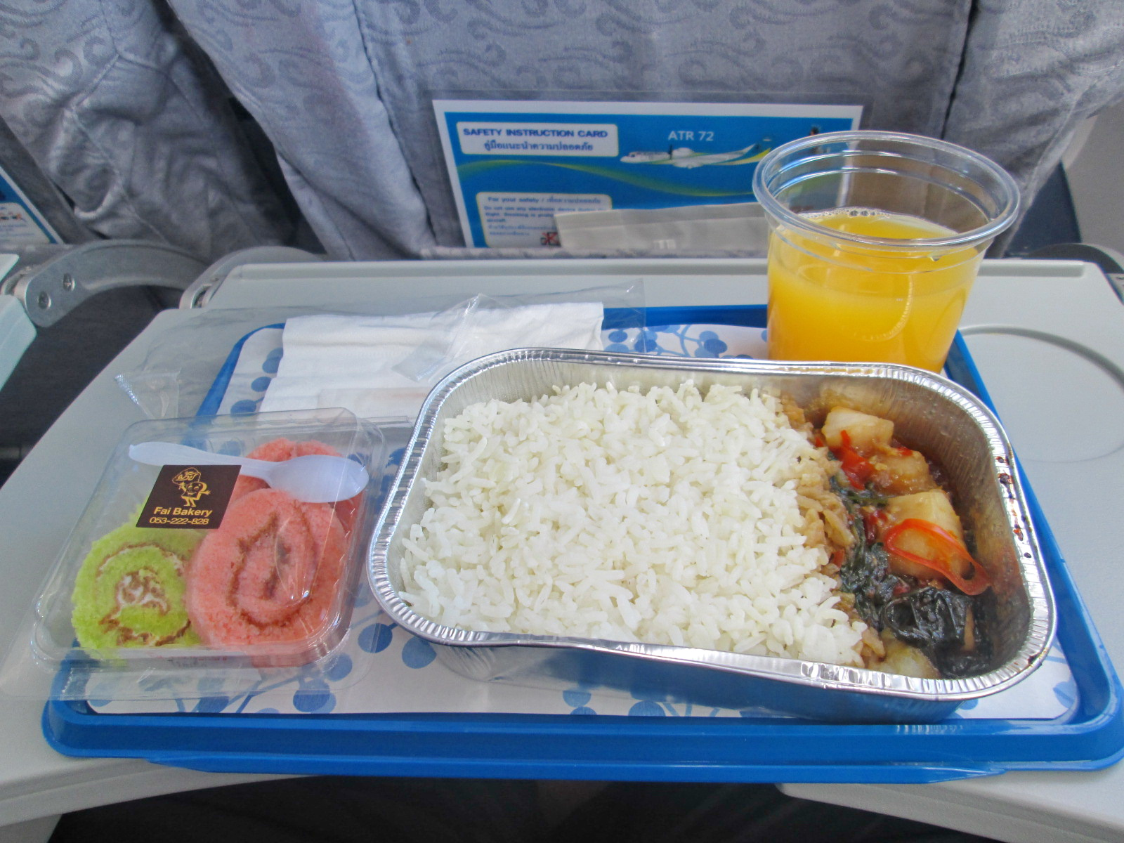 เมนูอาหารที่ให้บริการบนเที่ยวบิน